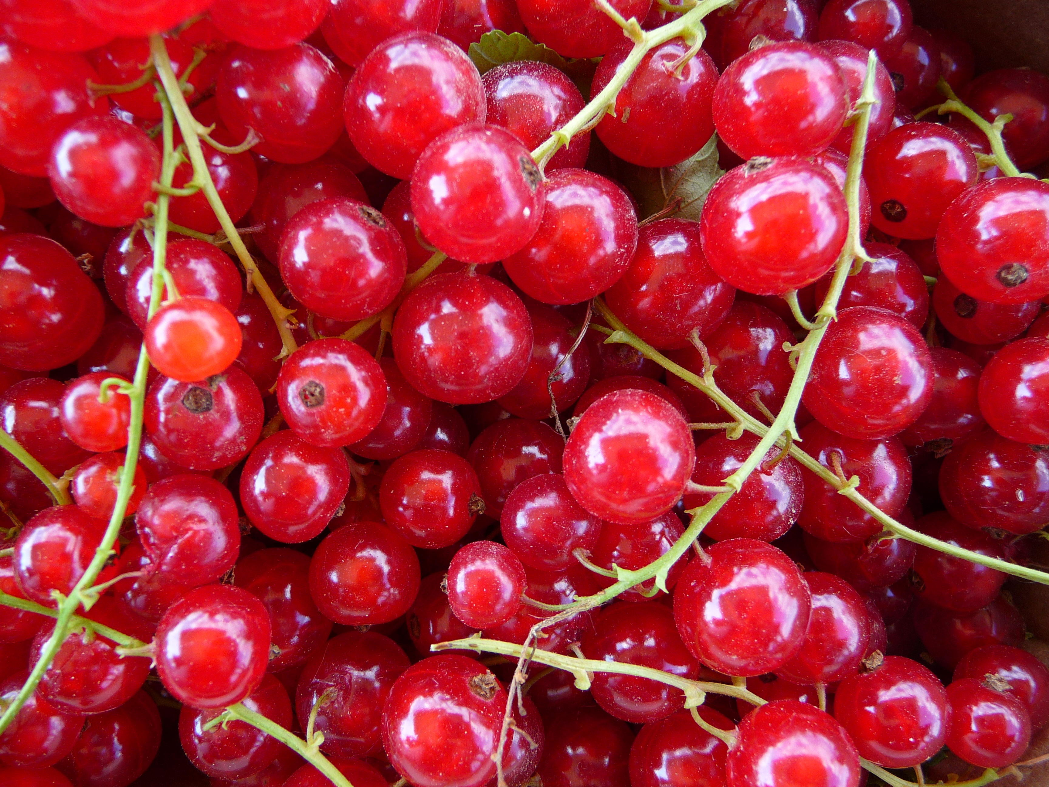 Schälchen mit frisch gepflückten roten Johannisbeeren (Ribes rubrum)